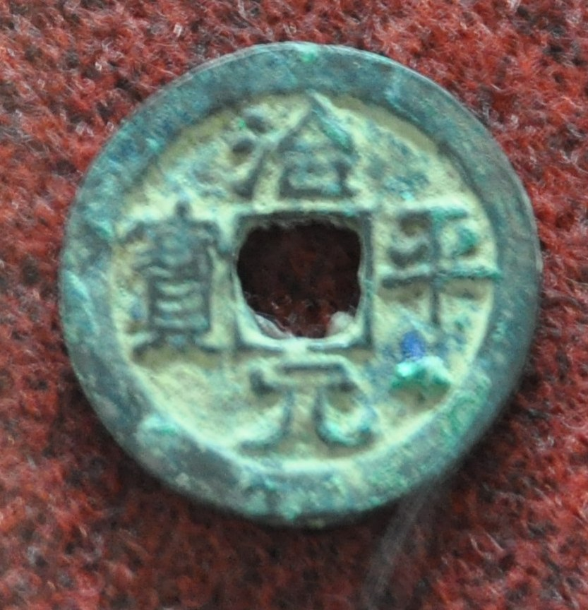 호찌민시에 있는 베트남 역사 박물관, 에 전시된 리 왕조(1009~1225) 의 Lý Cao Tông (리 고종, 李高宗) 때(1175~1210년) 때의 동전인 Trị Bình Nguyên Báo 治平元寶 (치평원보)